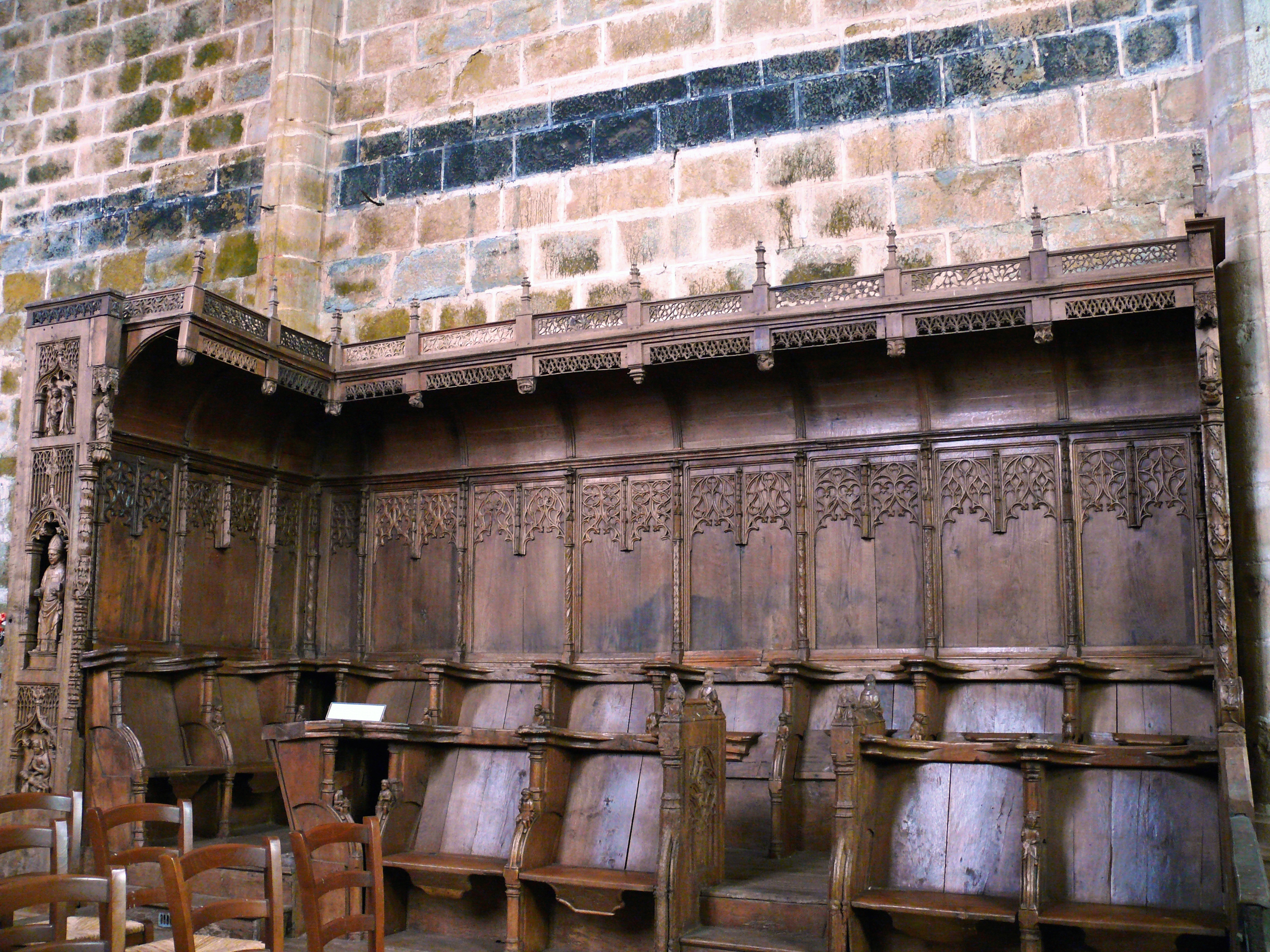 Château de Castelnau-Bretenoux - Collégiale Saint-Louis - Stalles